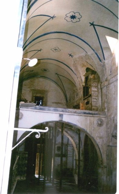 Vista interior del coro del Monasterio de San Ginés de la Jara, en Cartagena (España). Para 2009, ocho años después de esta fotografía, la caja del órgano había desaparecido.